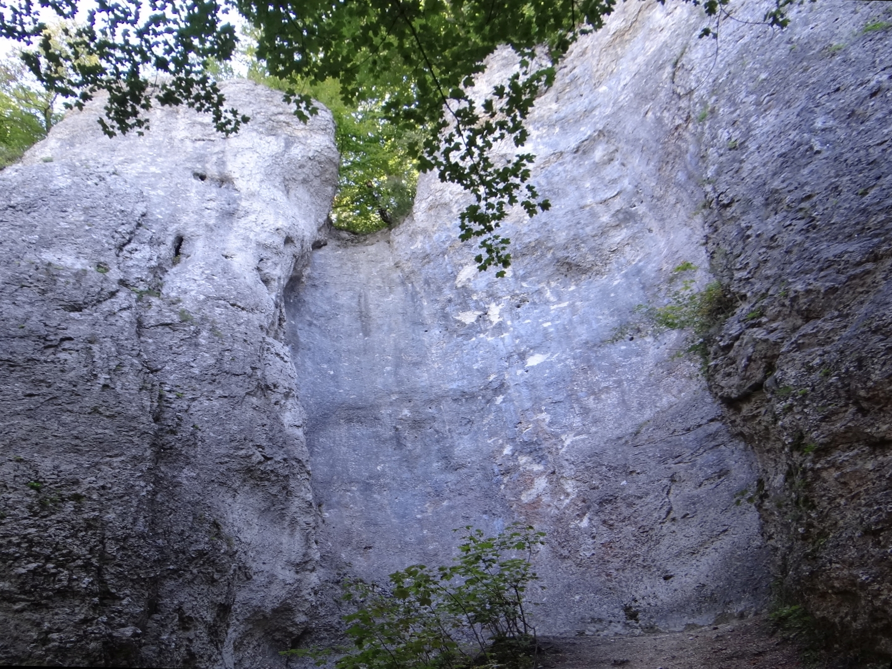 Skały Cmentarzyska w Dolinie Będkowskiej